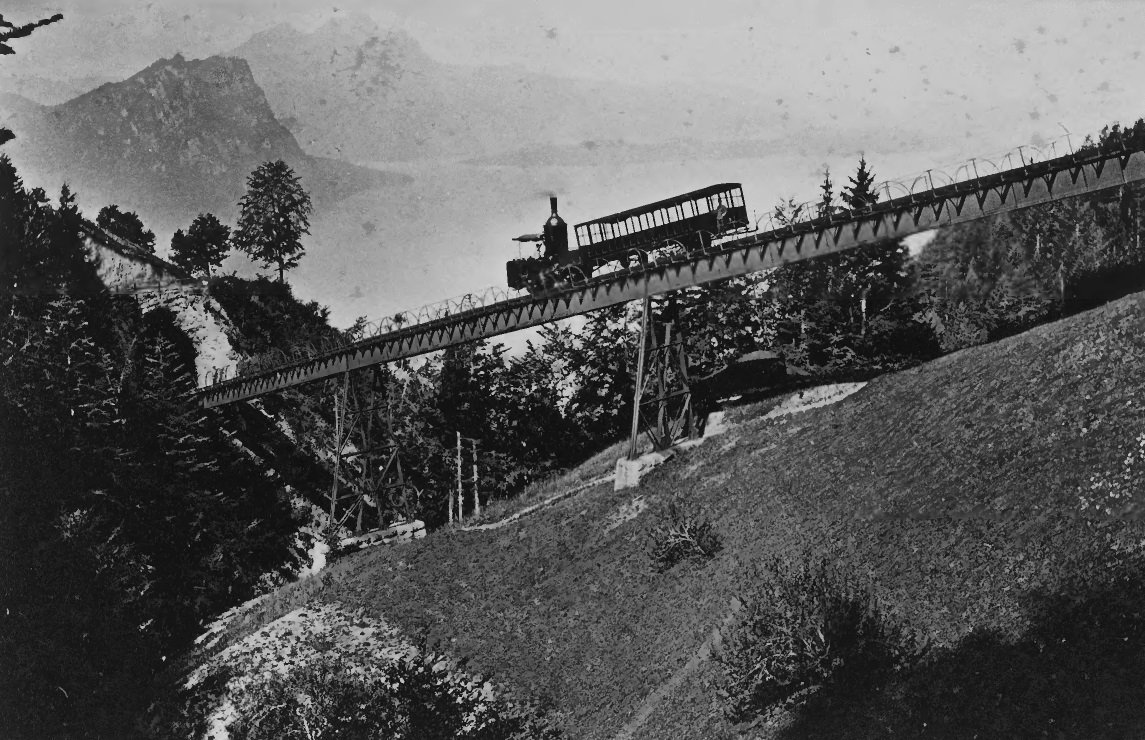 Zug der Rigibahn mit Lokomotive H 1/2 auf dem Schnurtobelviadukt